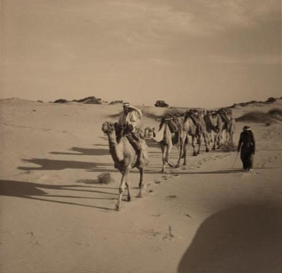 גמלים בדיונה דרומית לבנימינה 1937